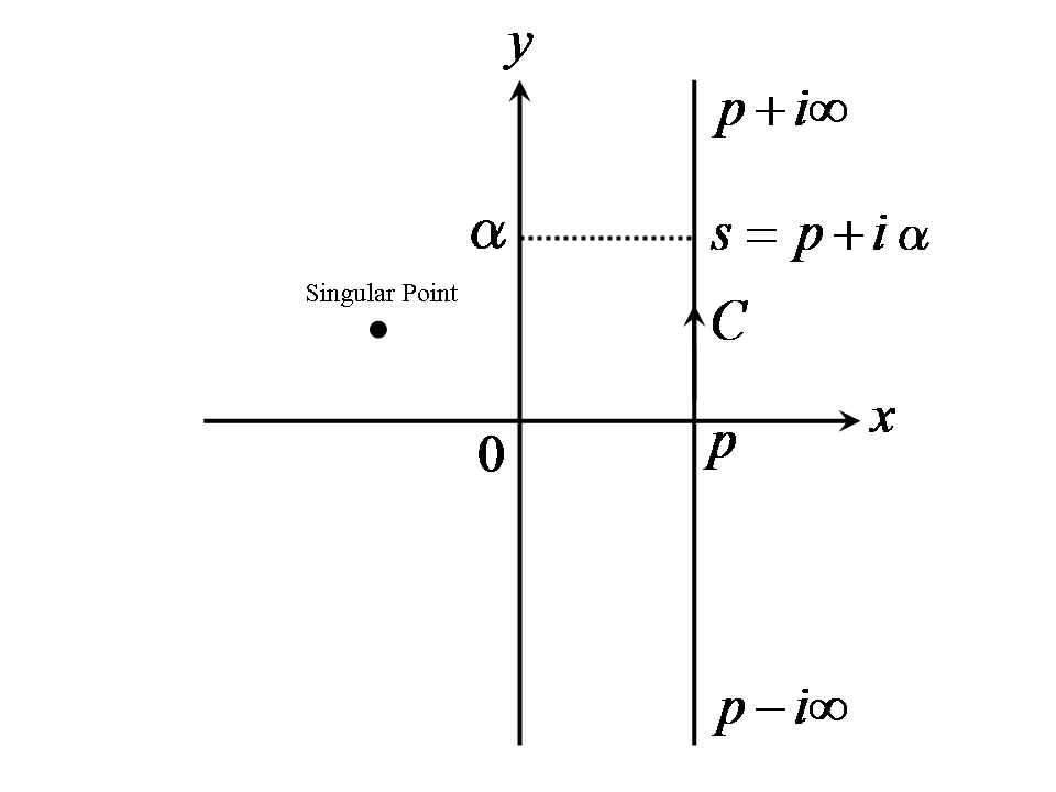 複素平面によるブロムウィッチ積分の解説